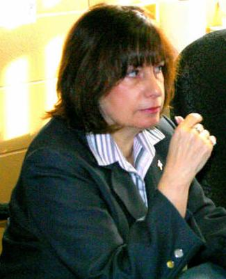 Rencontre de courtoisie avec l'ancienne député Jocelyne Caron.